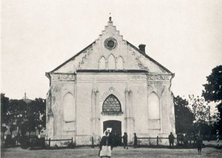 Беларуская (тарашкевіца): Хомск (Chomsk). Сынагога